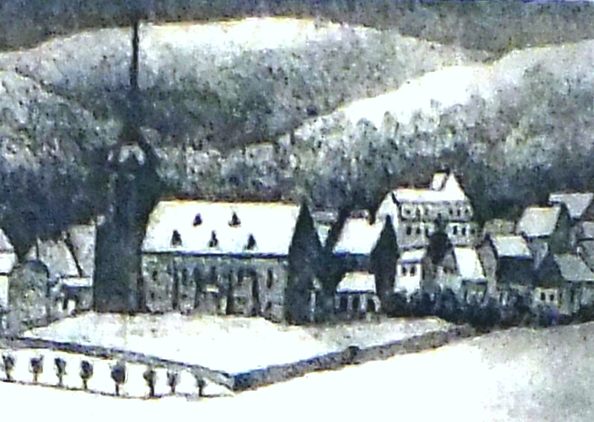 Oberwiesenthal, Martin-Luther-Kirche: Vorgängerbauwerk (2)